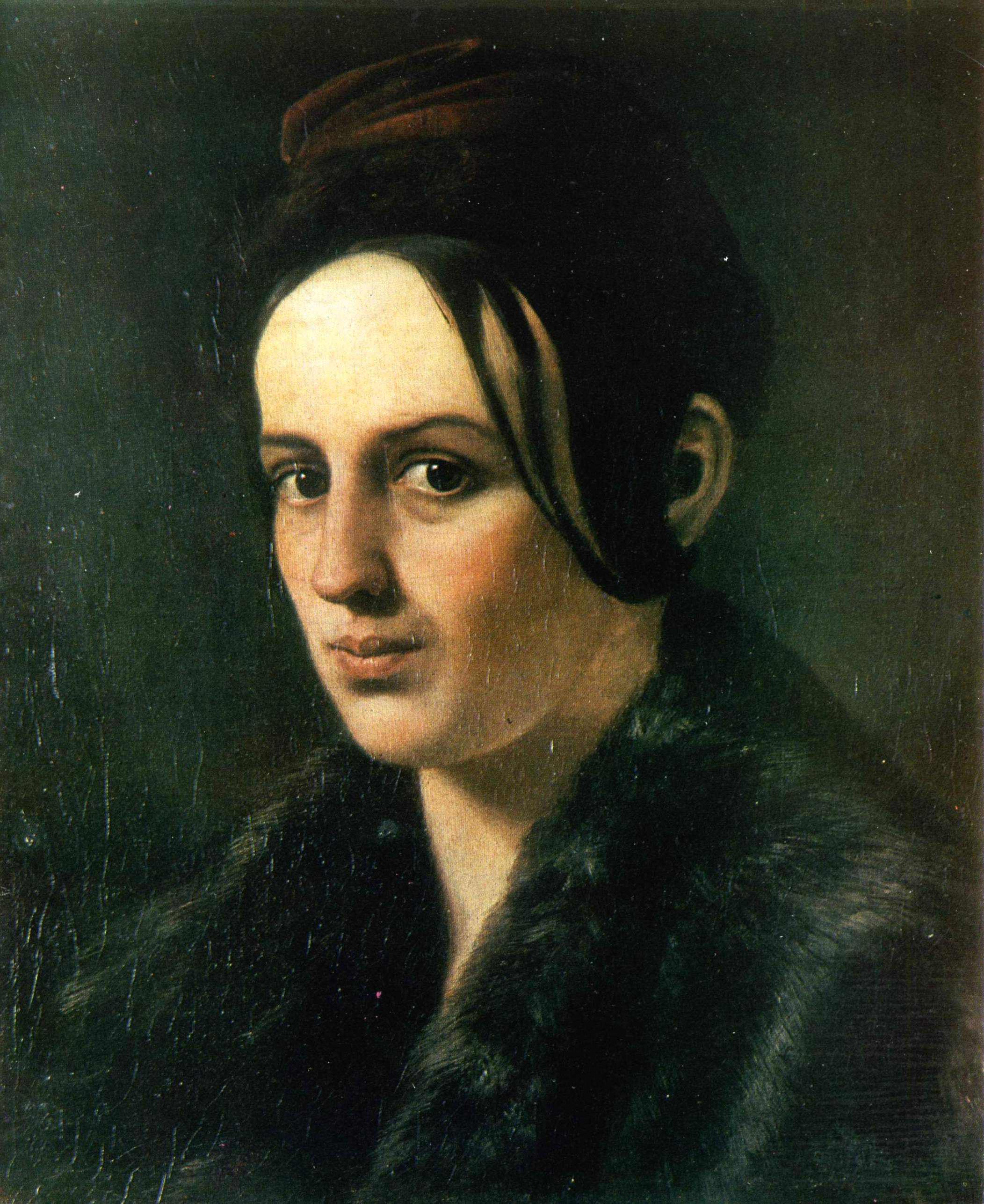 Портрет В.Н. Репниной. 1839 Холст, масло . 46 x 37 см Национальный музей Тараса Шевченко, Киев, Украина Инв. номер: ж-58